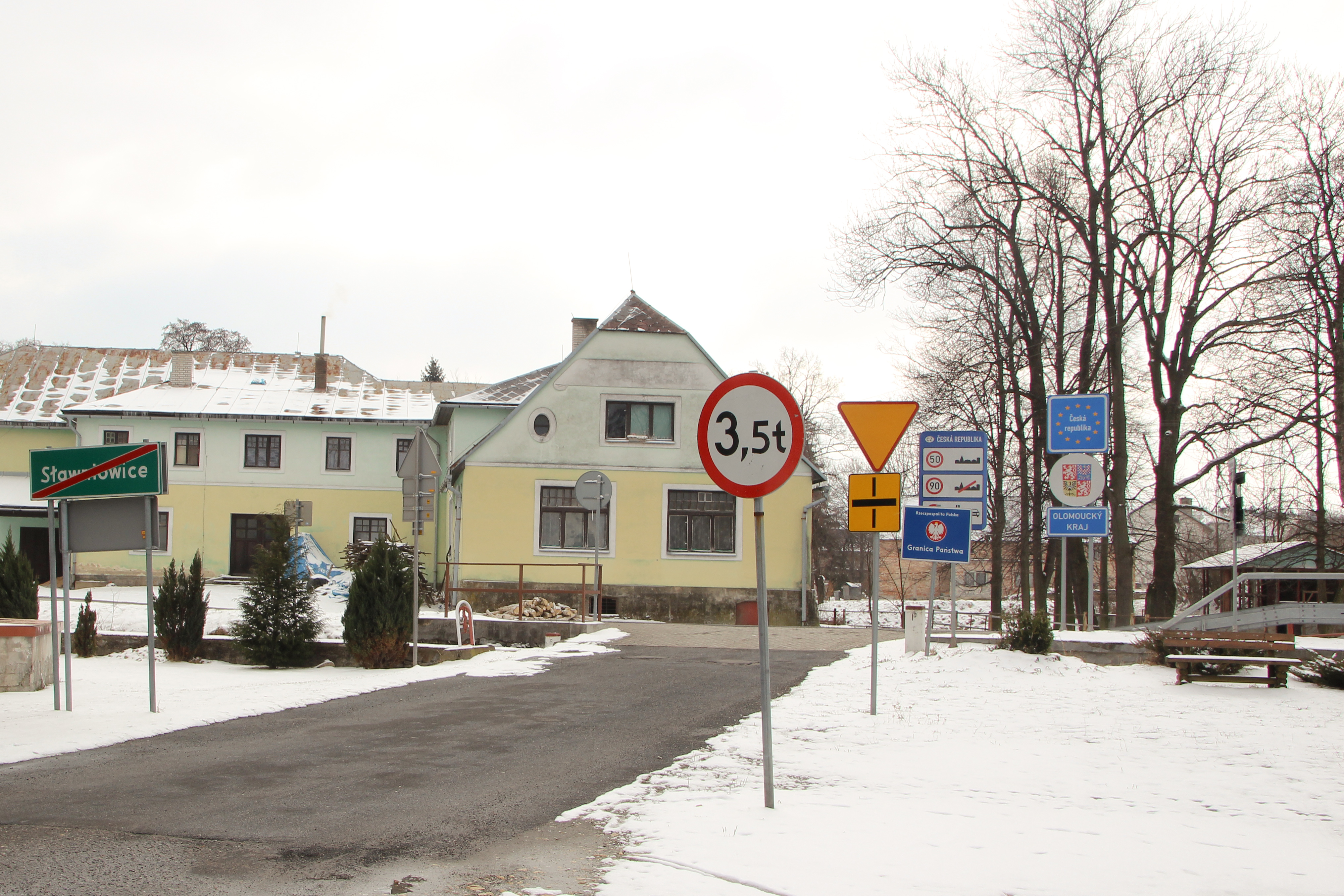 Sławniowice – wieś w Polsce, w województwie opolskim, w powiecie nyskim, w gminie Głuchołazy. Przejście graniczne Sławniowice–Velké Kunětice — widok od strony polskiej